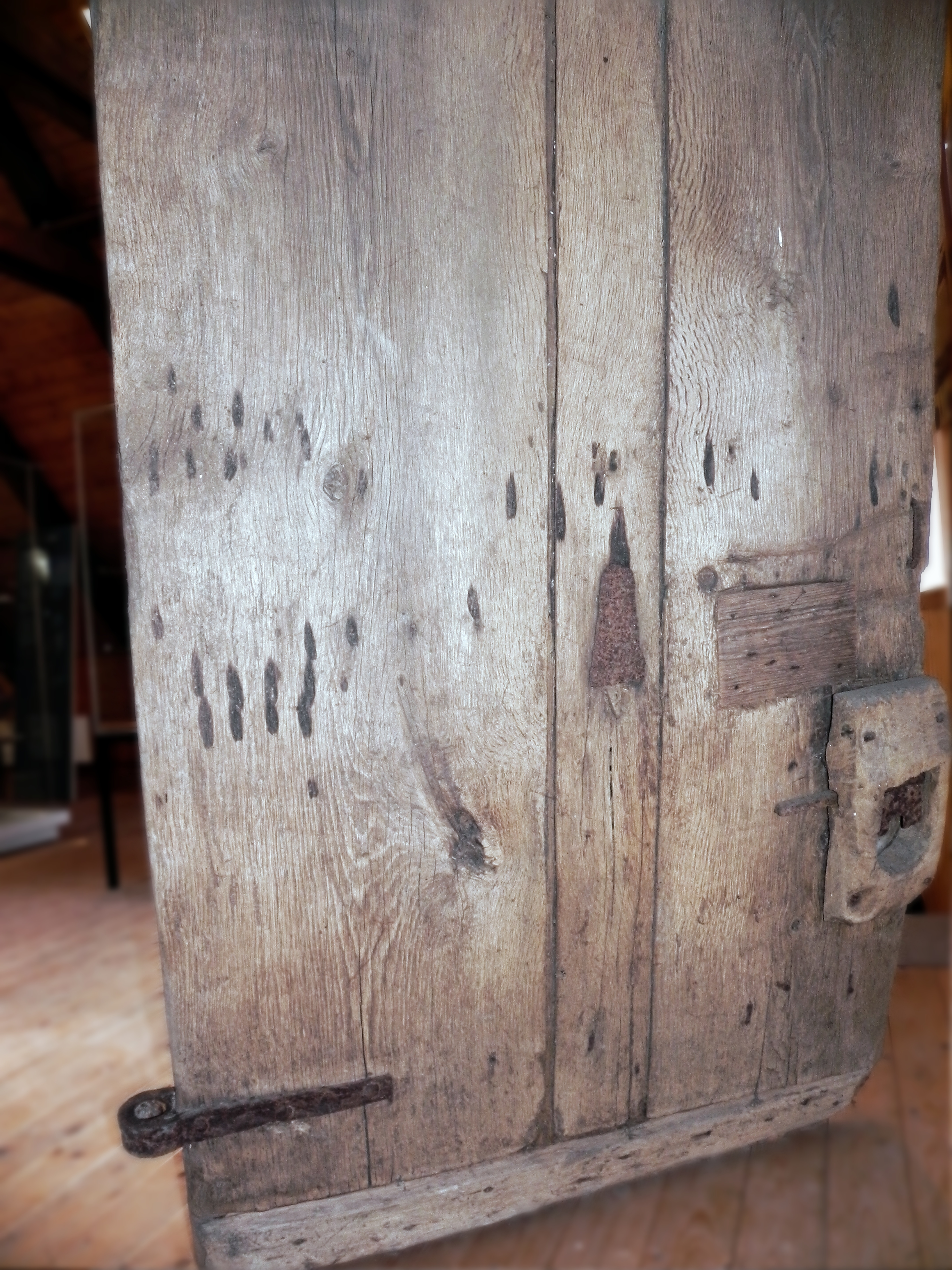 Innenseite der Tür der Waldkapelle von Wohlde, im Museum Römstedthaus Bergen (Landkreis Celle)